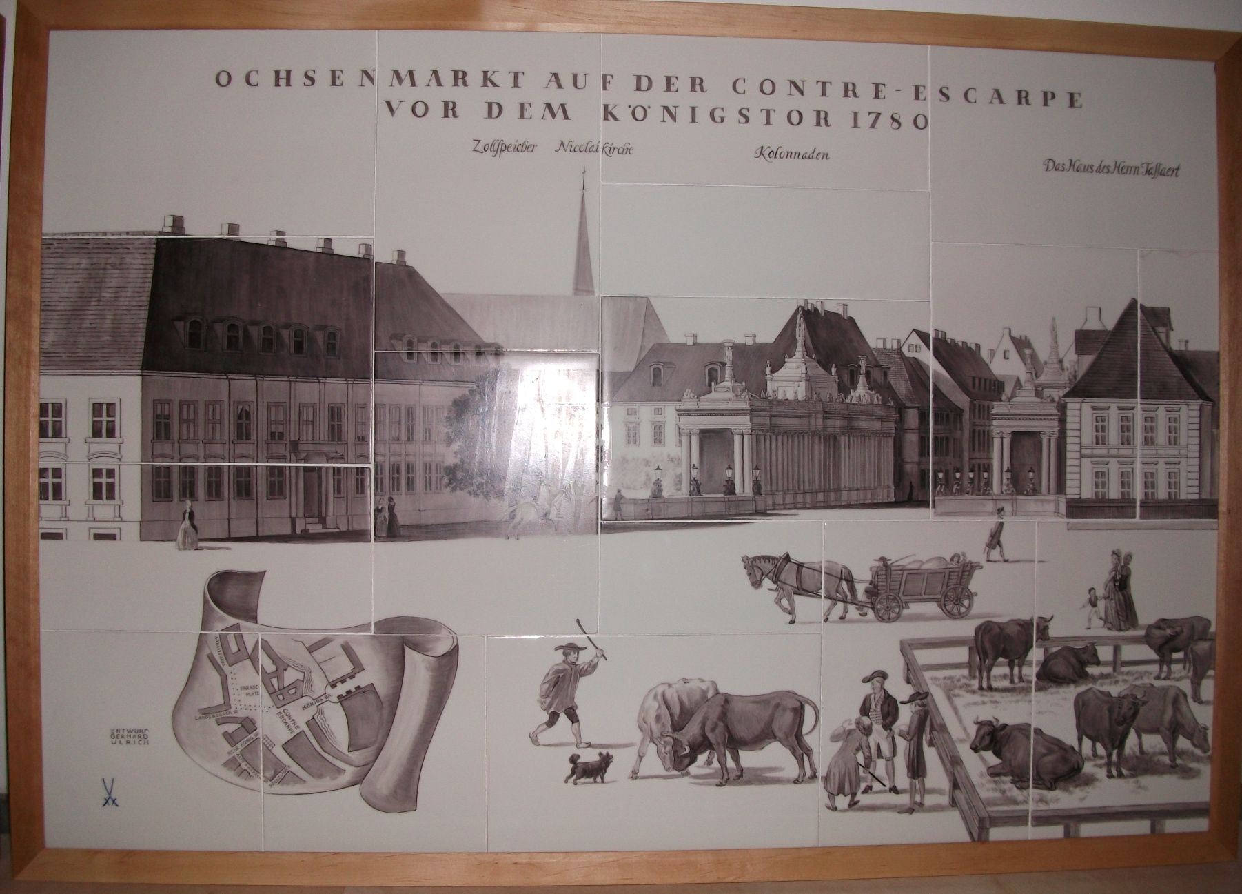 Fliesenbild Alexanderplatz